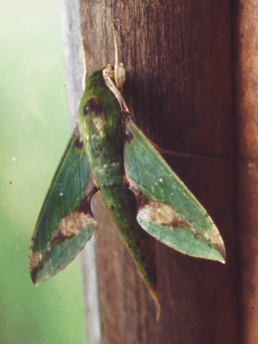 Xylophanes chiron, Schwärmer (Sphingidae), - Costa Rica: Cordillera de Talamanca, Carretera Interamericana SW Cartago, ca. 1900 m